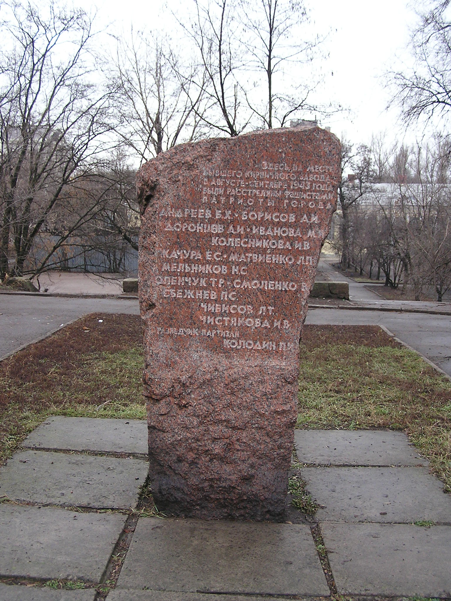 Донецк. Растрелянным патриотам города